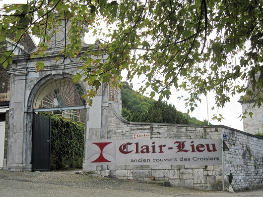 Le Couvent des Croisiers "Le Clair-Lieu" à Huy (Belgique)